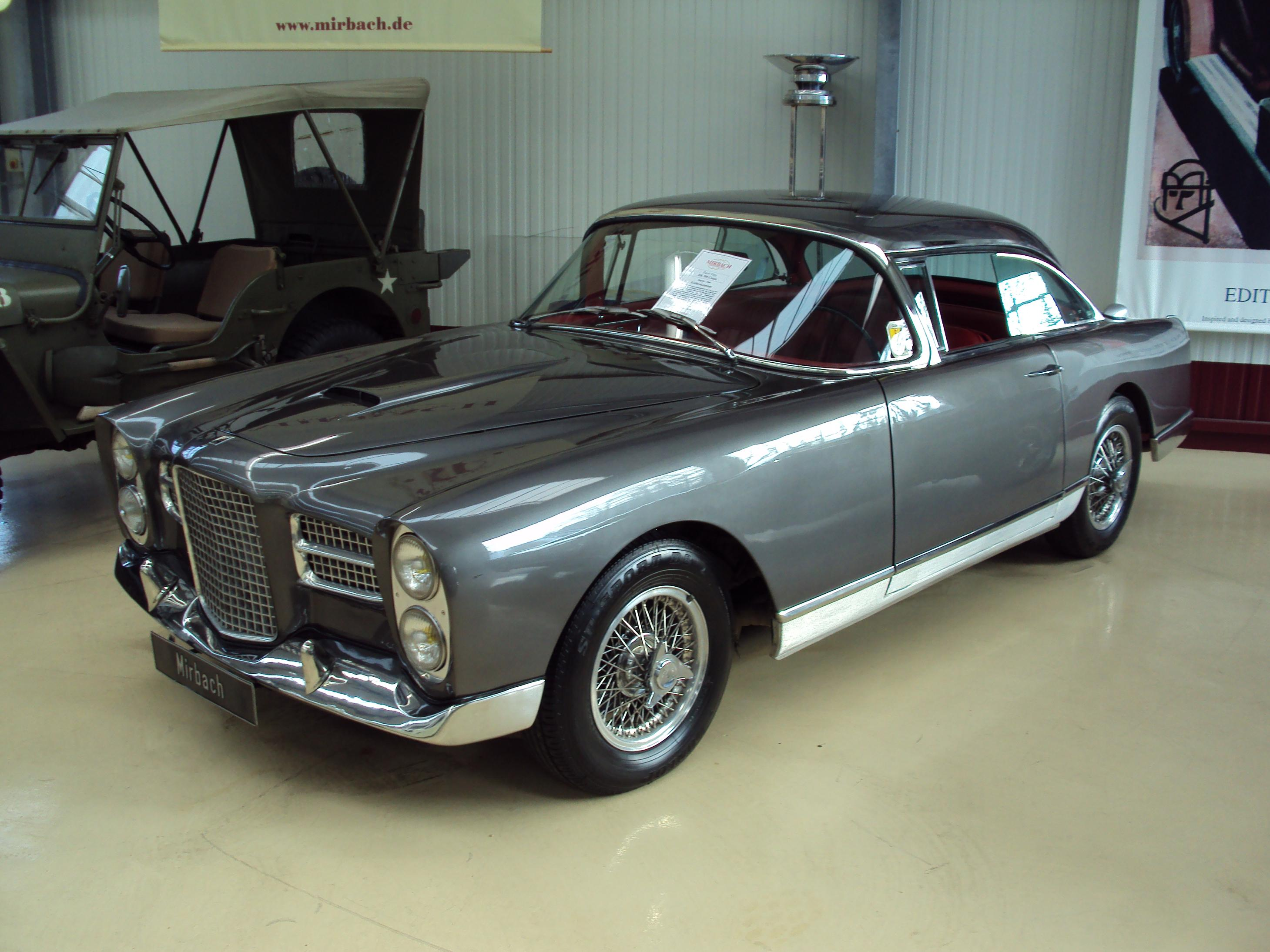 C.F. Mirbach, Hamburg